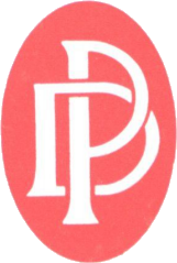 1946 yılında Türkiye'de kurulan Demokrat Partinin logosu.